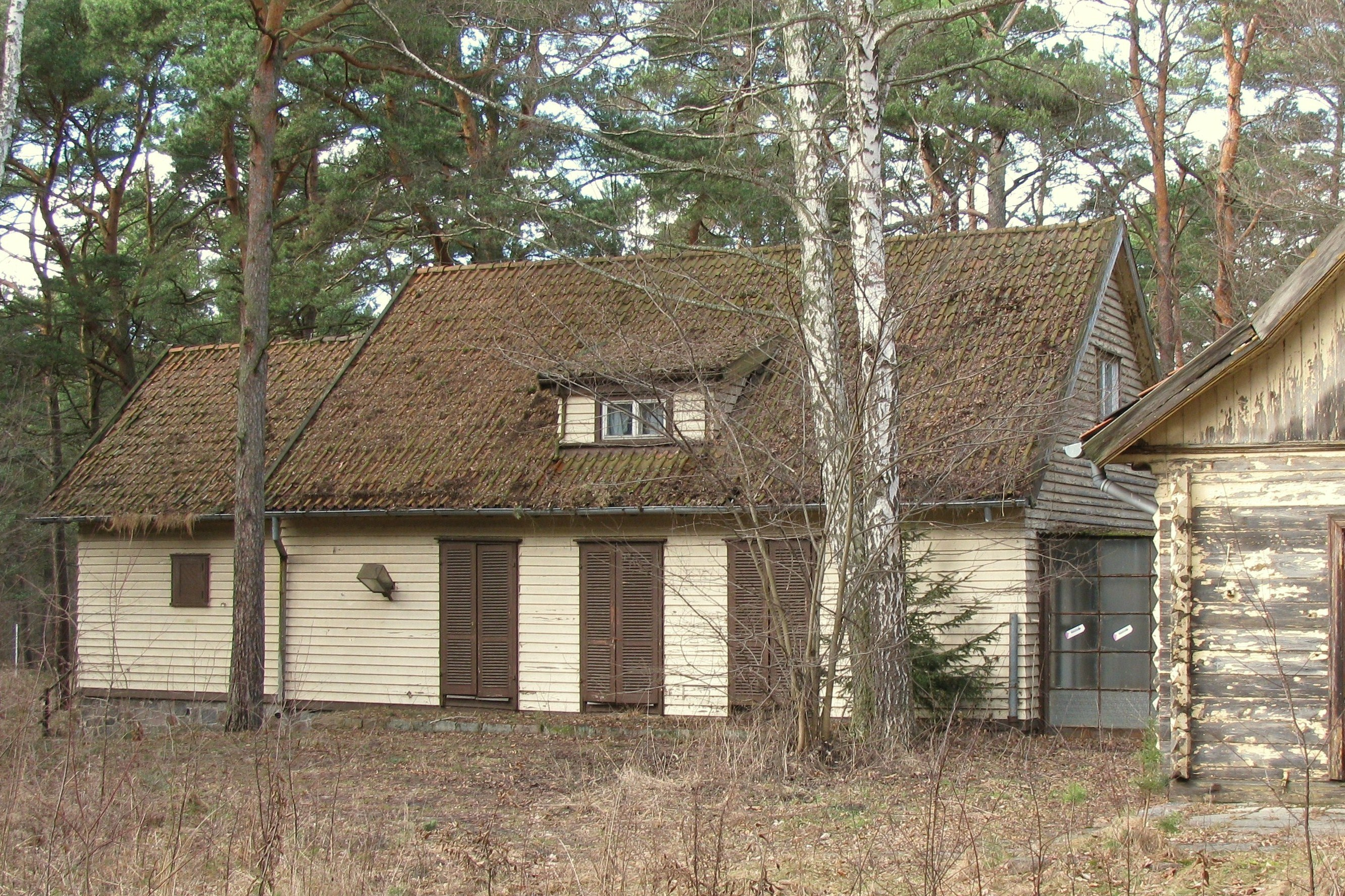 Gdańsk Orle. Dawna rezydencja niemieckiego zbrodniarza hitlerowskiego, Alberta Forstera. Front budynku kuchenno-jadalnego.